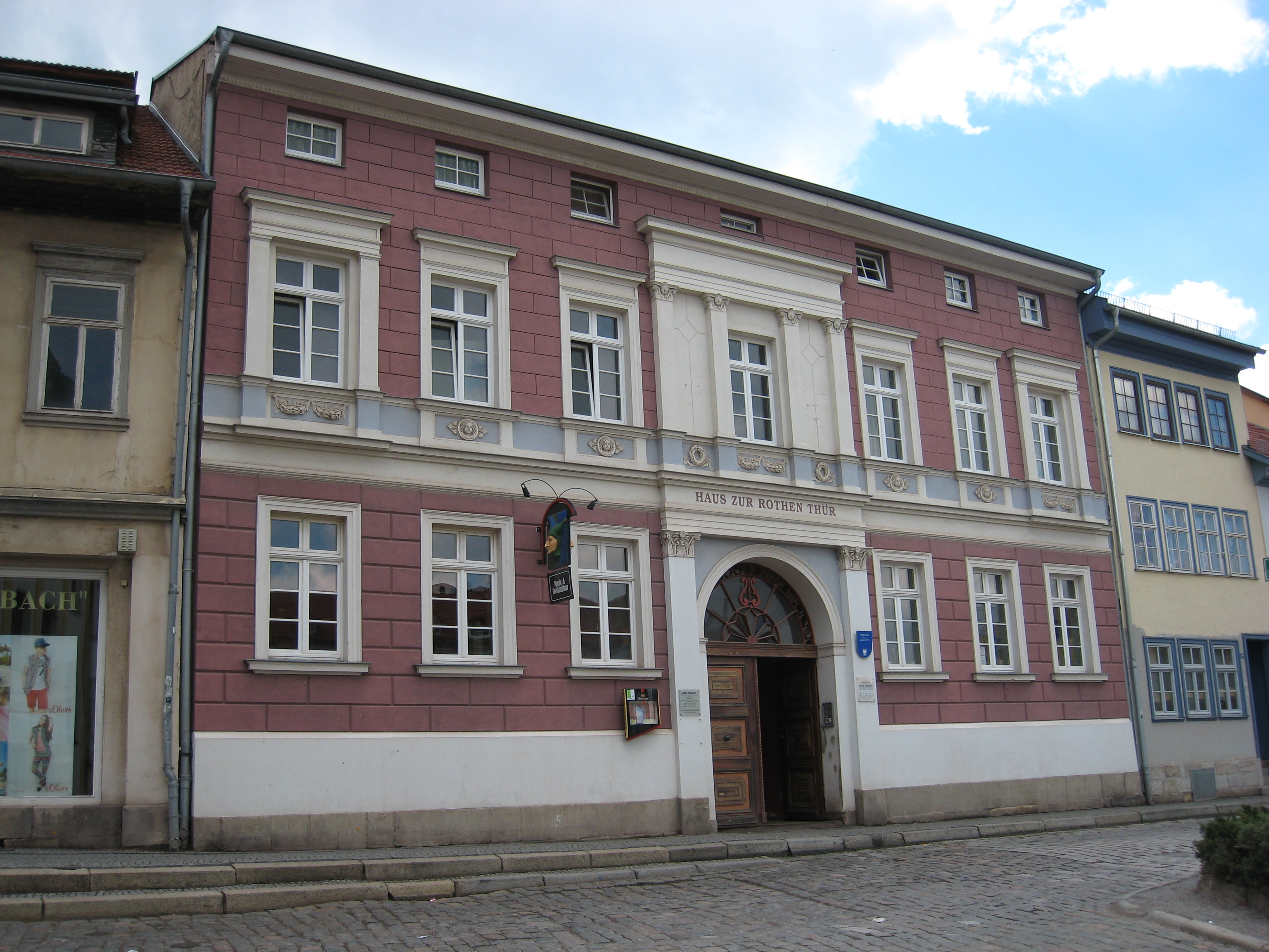 Das Haus Zur rothen Thür in Arnstadt, Unterm Markt 10.